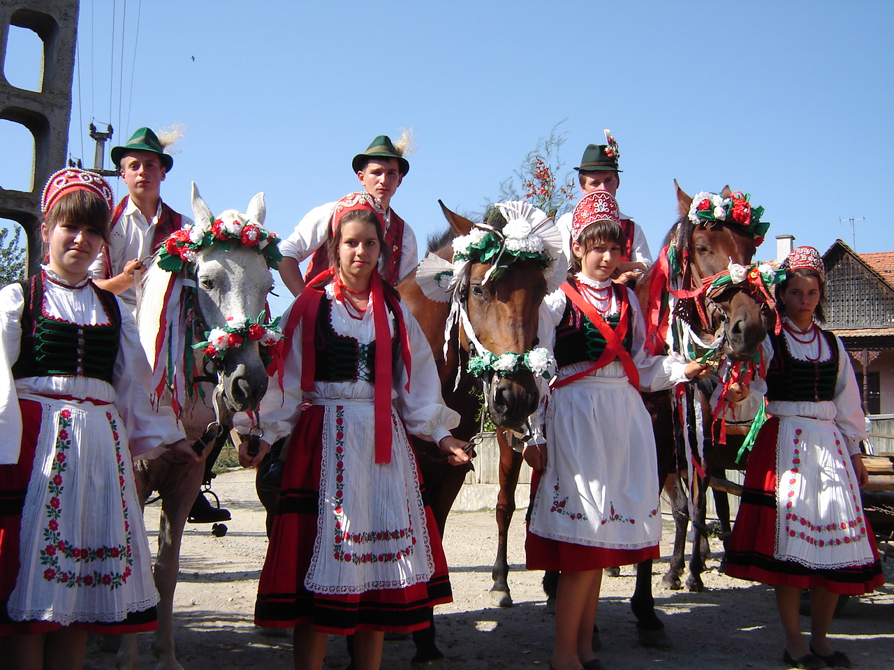 Szüretibálozó fiatalok Siklódon